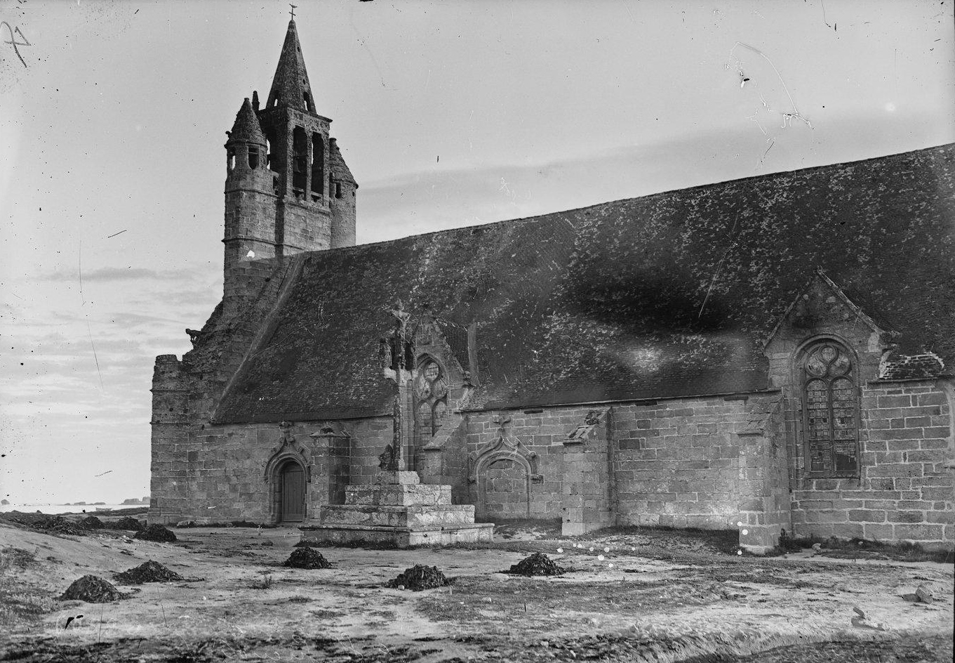 Penmarch : la chapelle Notre-Dame-de-la-Joie en 1921